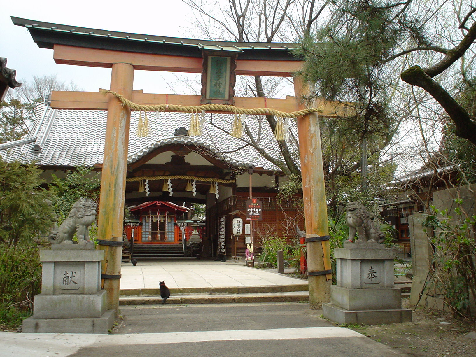 Kohata shrine, Gokasho, Uji, Japan 宇治市五ヶ庄のja:許波多神社